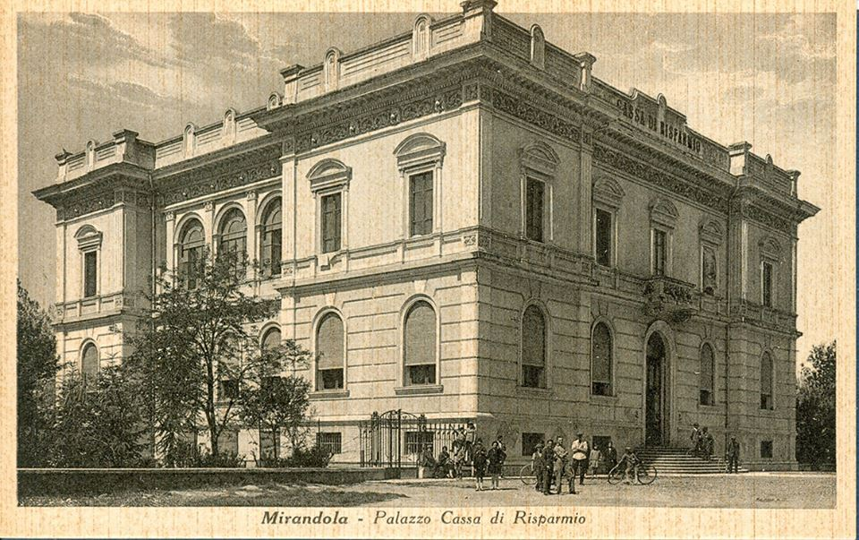 Palazzo della Cassa di Risparmio di Mirandola negli anni 1930